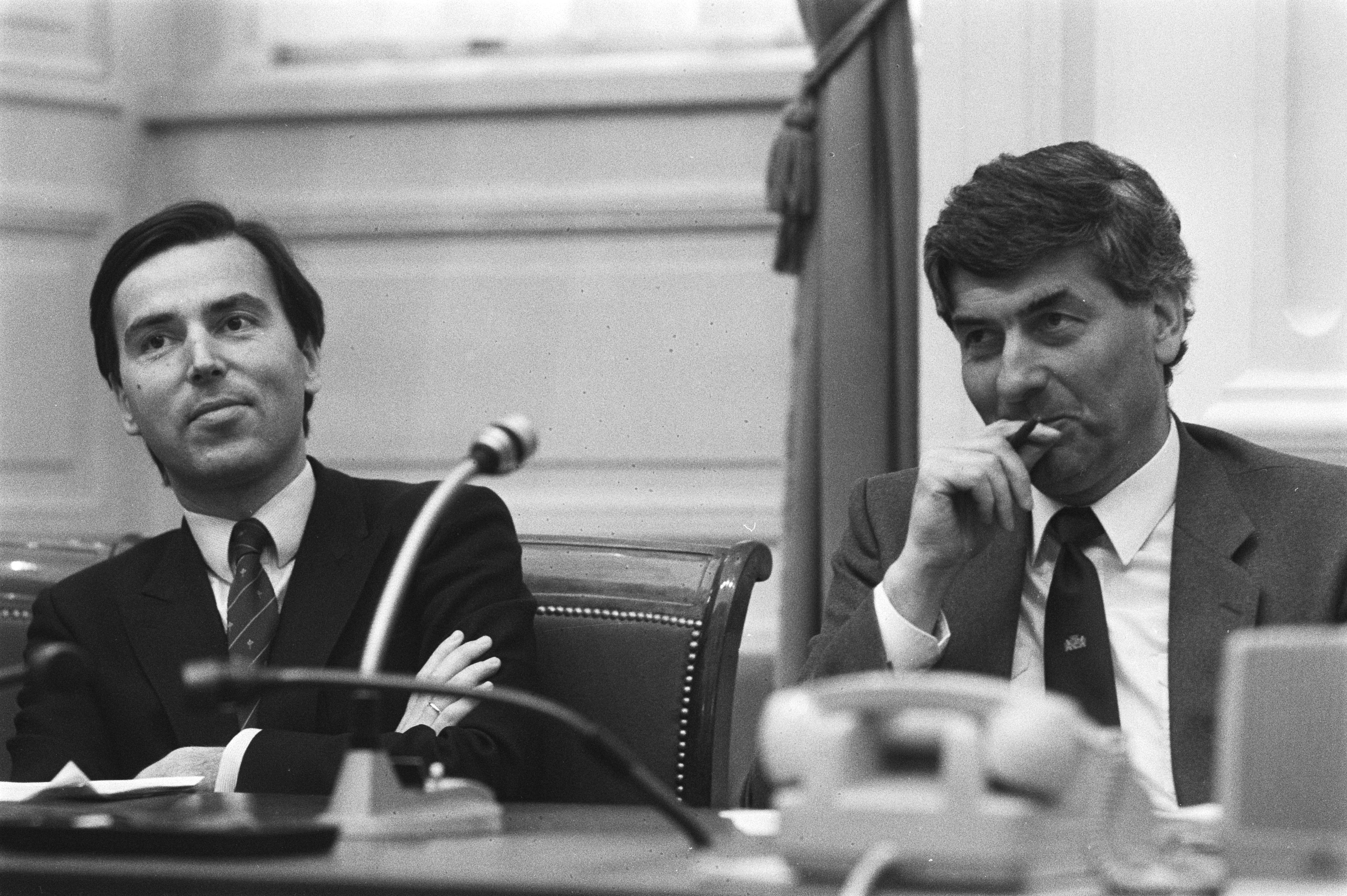 Collectie / Archief : Fotocollectie Anefo Reportage / Serie : [ onbekend ] Beschrijving : Tweede Kamer : interpellatie Den Uyl over uitlatingen minister Brinkman in Vrij Nederland ; premier Lubbers en minister Brinkman tijdens de interpellatie / Datum : 3 mei 1984 Trefwoorden : politiek Persoonsnaam : Brinkman, Elco, Premier Lubb, Uyl, Joop den Fotograaf : Croes, Rob C. / Anefo Auteursrechthebbende : Nationaal Archief Materiaalsoort : Negatief (zwart/wit) Nummer archiefinventaris : bekijk toegang 2.24.01.05 Bestanddeelnummer : 932-9560